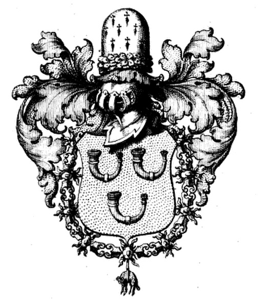 Praenobilis Familia ex Brabantia